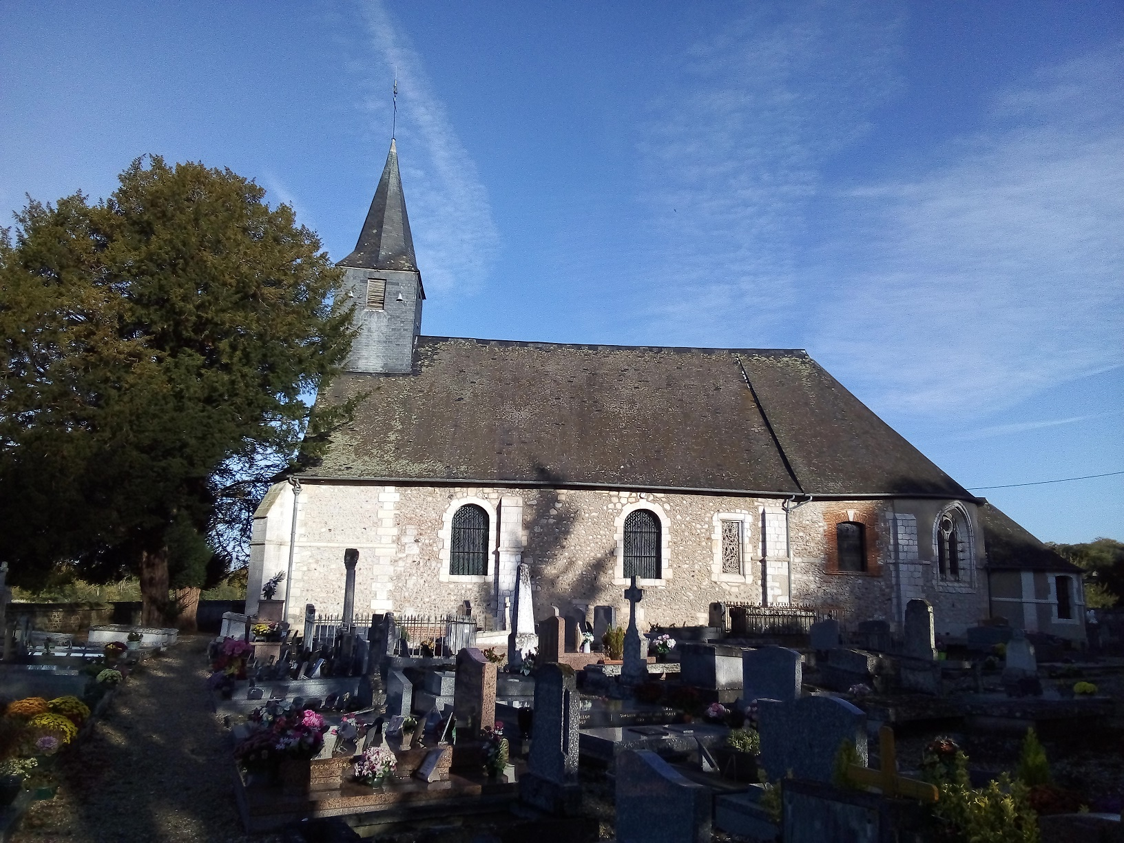 Eglise de Glos-sur-Risle (Eure, France)